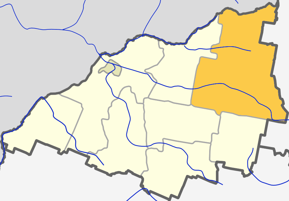 Расположение Илакяйское староства на карте Скуодасского района